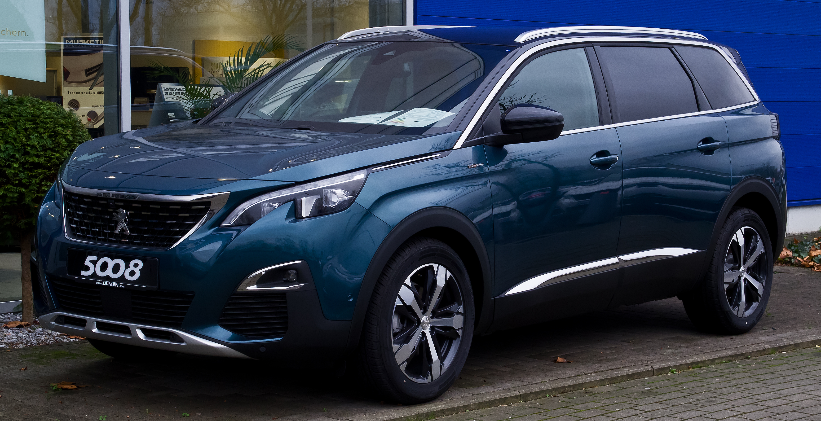 Peugeot 5008 PureTech 130 EAT6 Allure GT-Line (II)